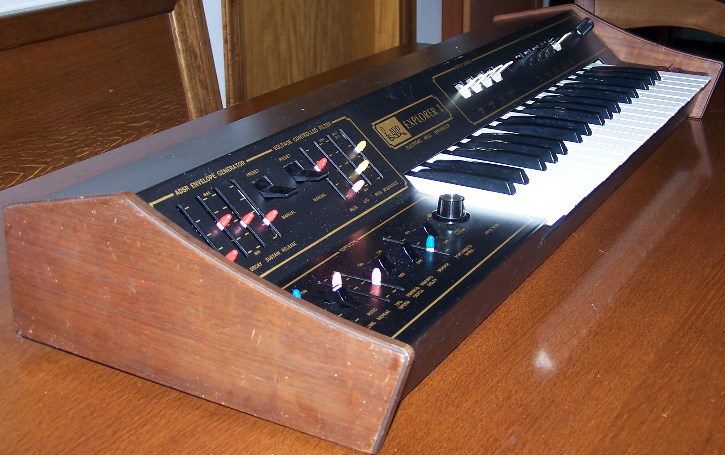 ARP Explorer